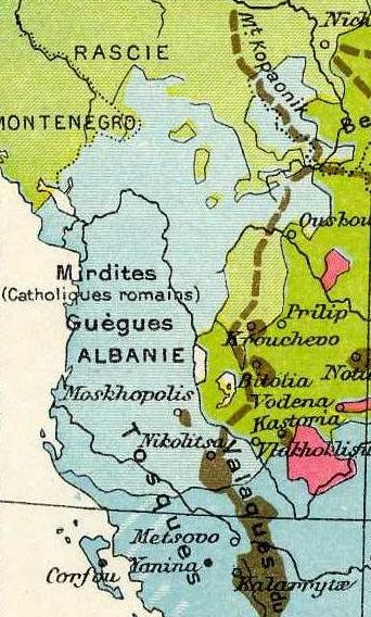 Carte ethnique des Albanie. Histoire Et Géographie - Atlas Général Vidal-Lablache, Librairie Armand Colin, Paris, 1898